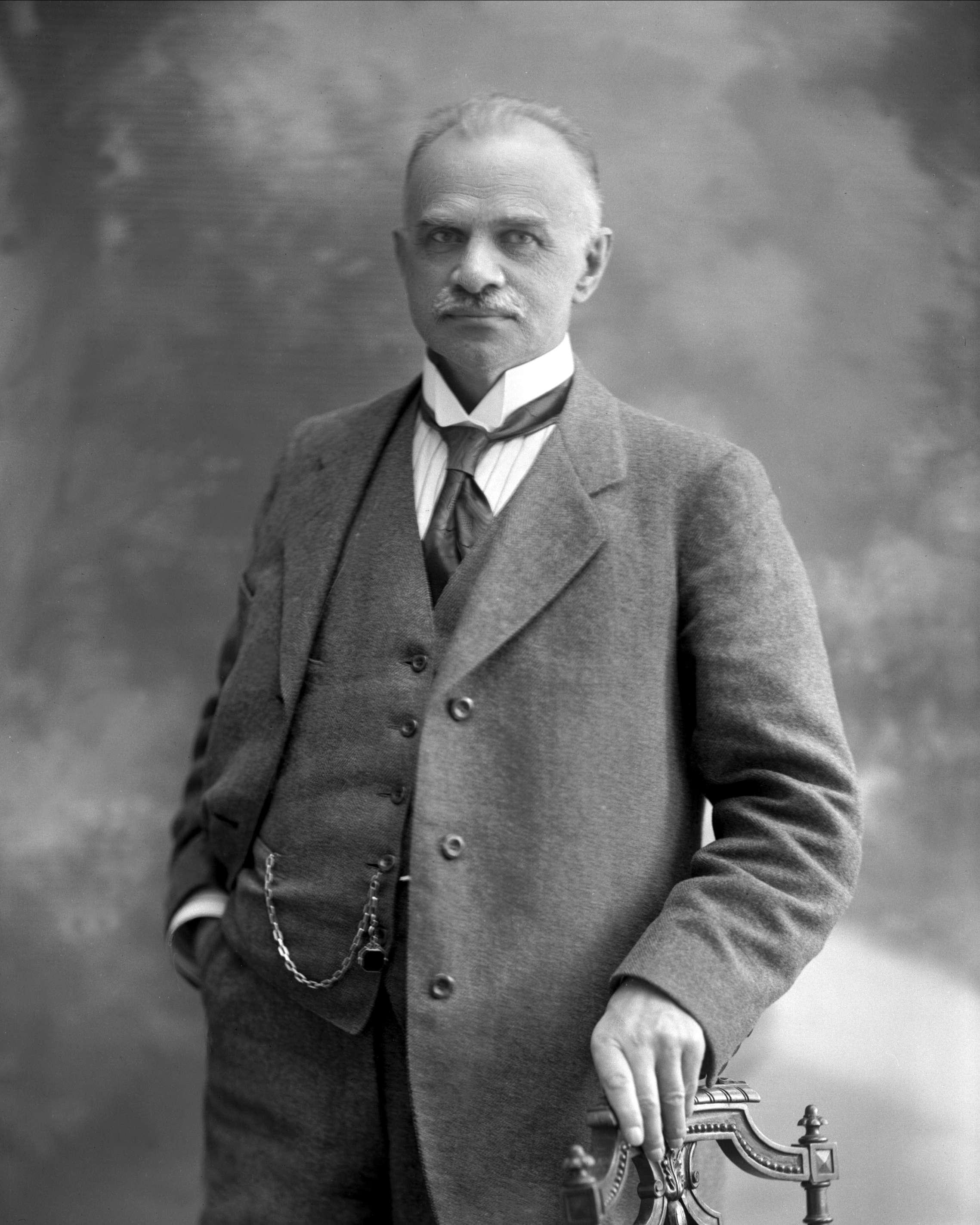 Otto Treider 1916